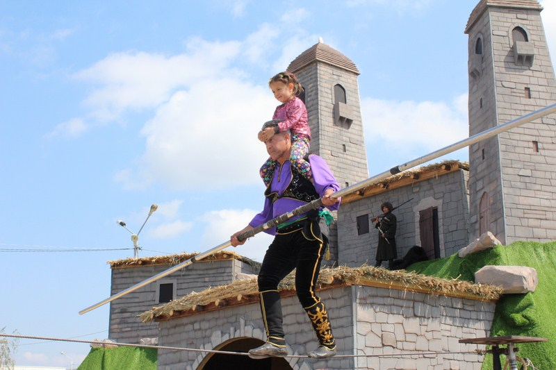 чеченский канатоходец Усман Дадаев